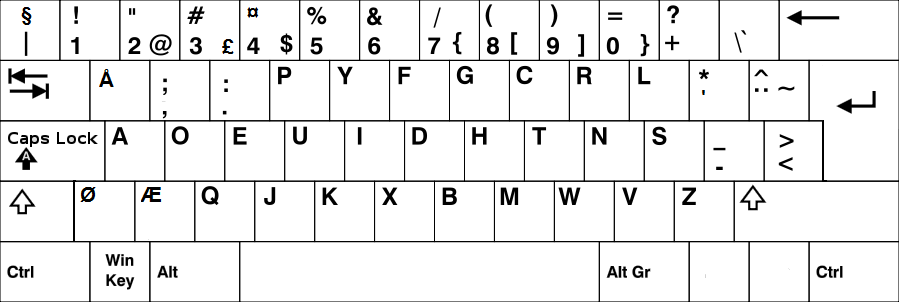 Et tastatur med norsk dvorakoppsett.